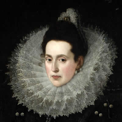 Retrato de Catalina de la Cerda († 1603), que fue duquesa consorte de Lerma por su matrimonio con Francisco de Sandoval y Rojas, primer duque de Lerma y marqués de Denia (detalle).